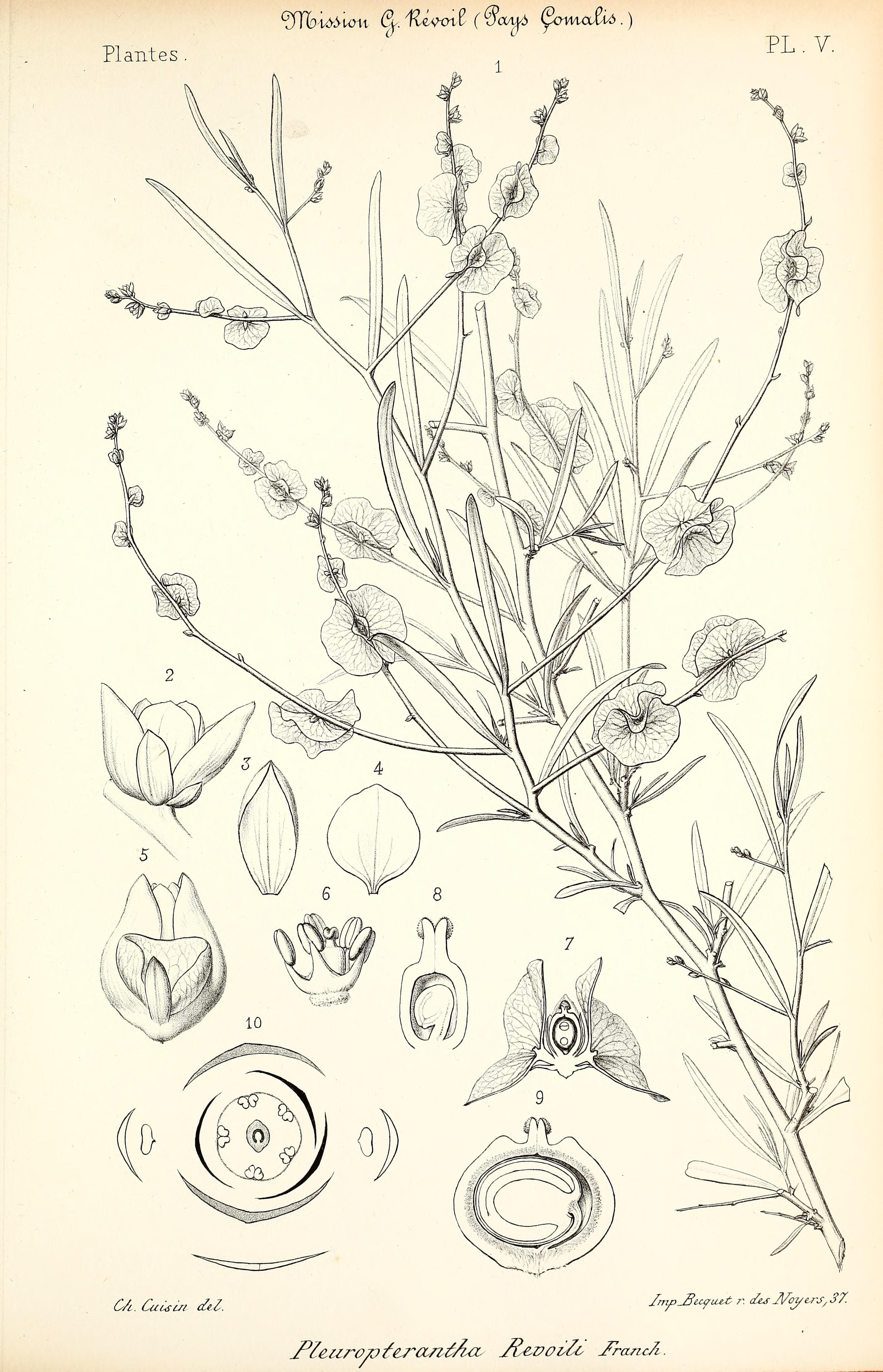 Faune et flore des pays Çomalis (Afrique orientale) /